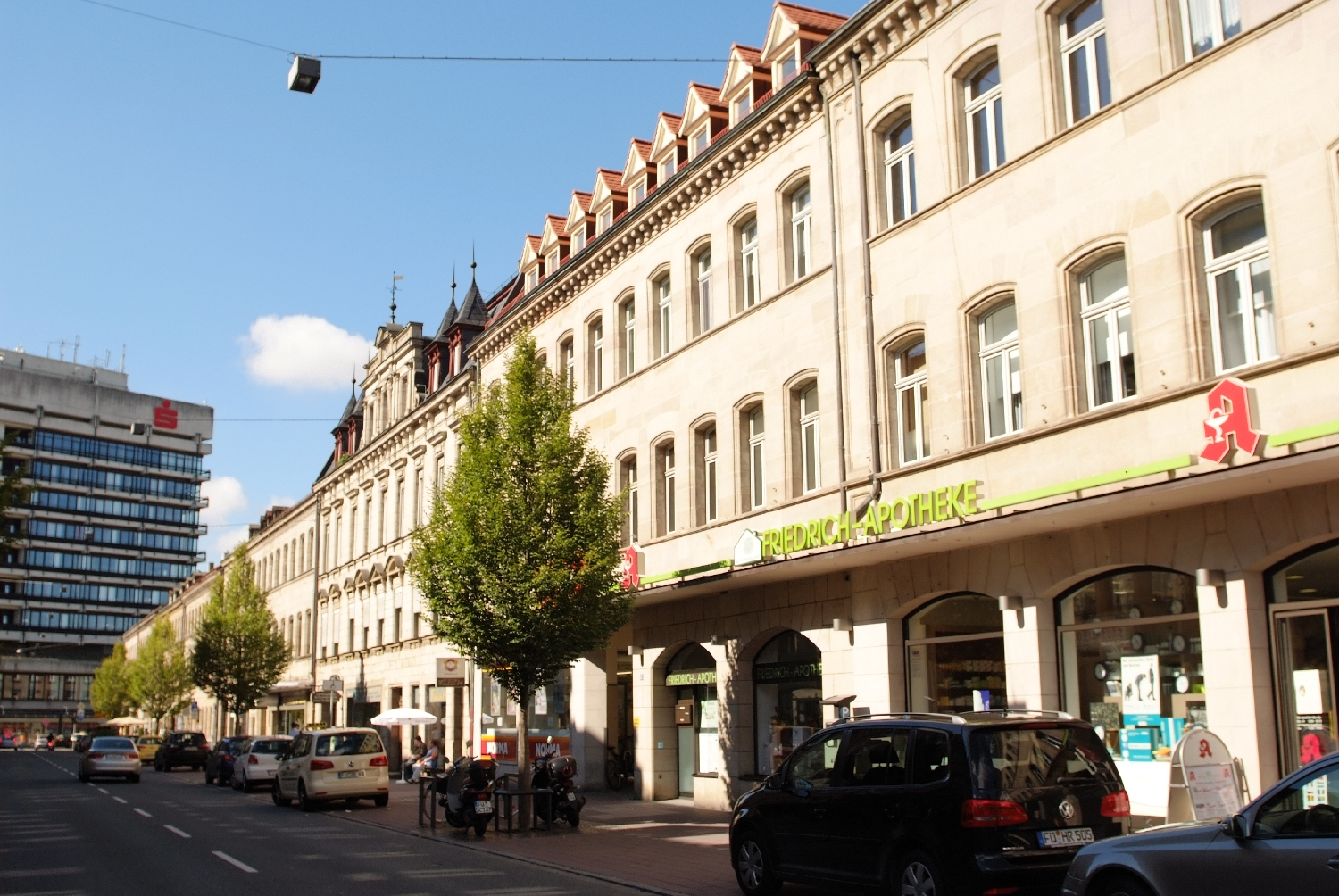 Fürth, Bavaria, Germany